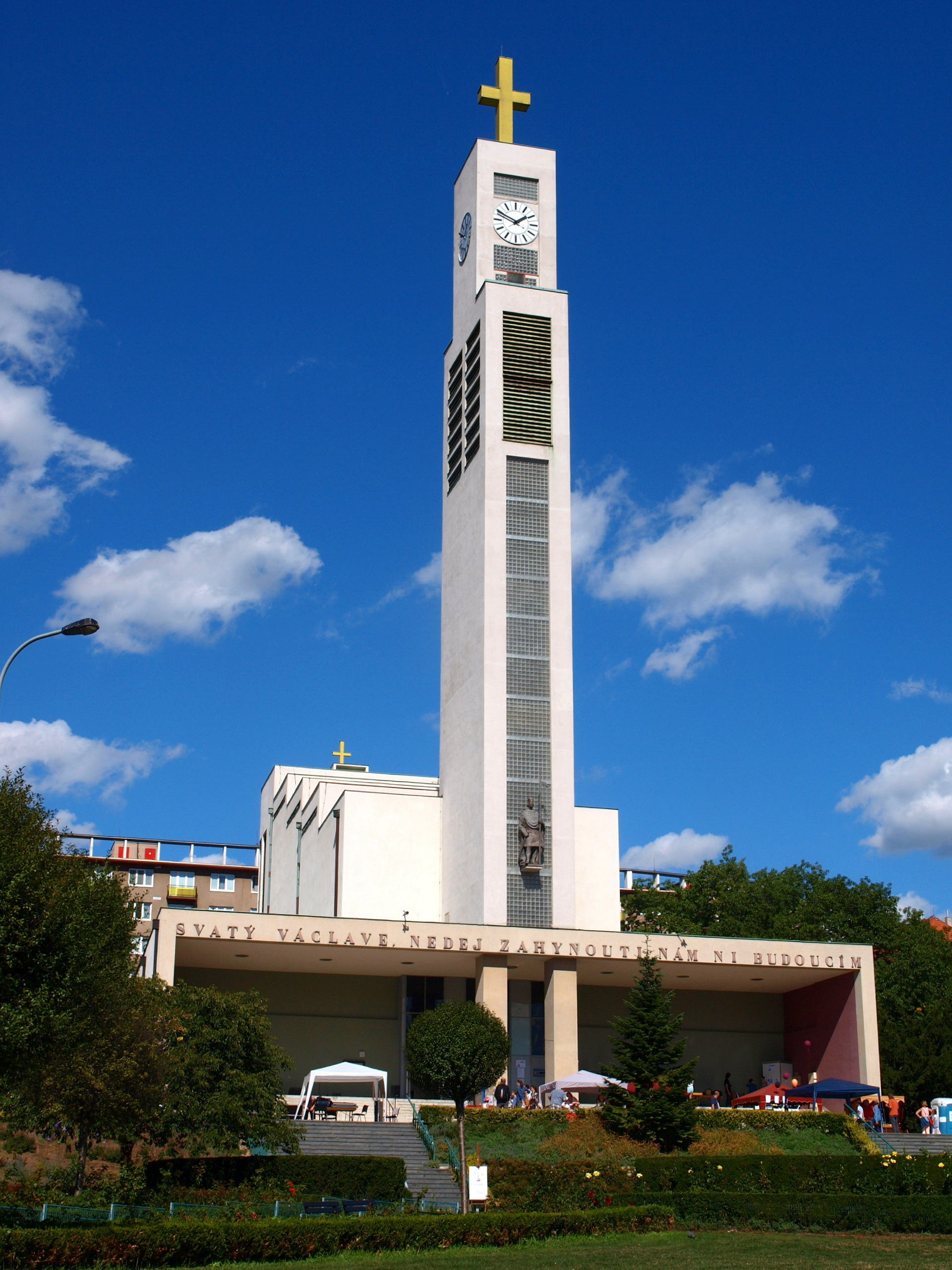 Vršovice, kostel sv. Václava